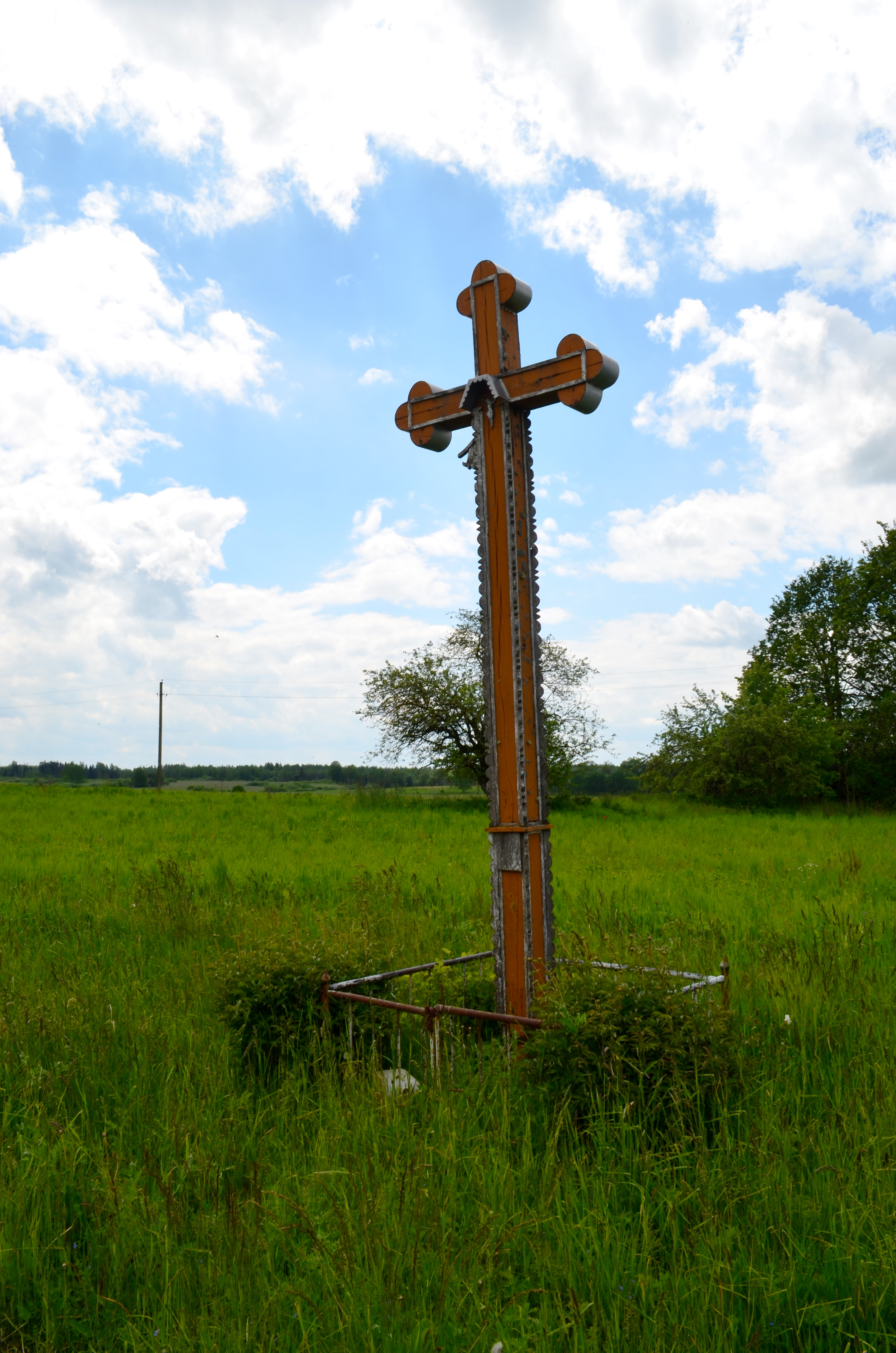 Kryžius Pusbačkiuose, Anykščių raj.